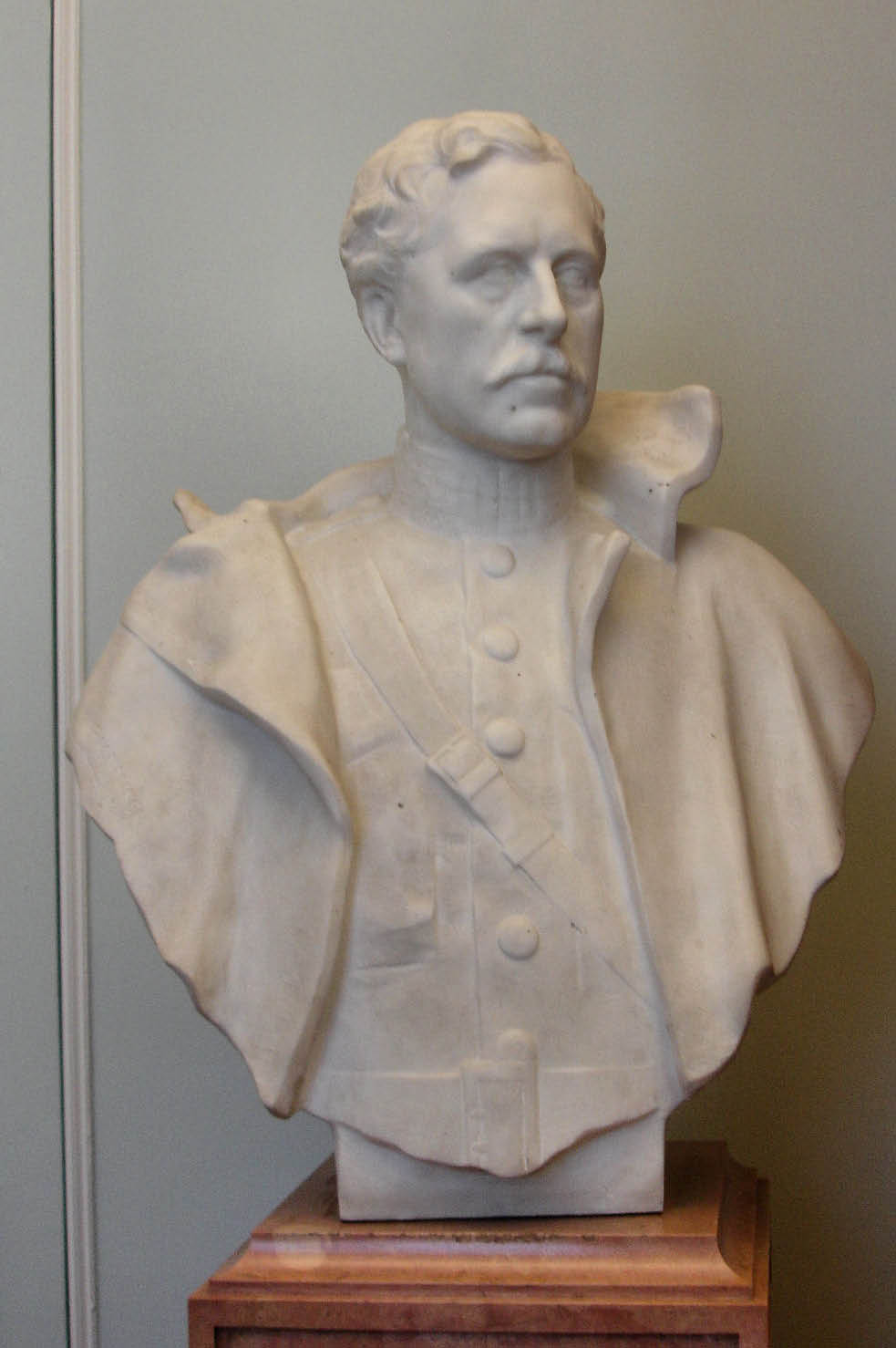 Borstbeeld van Albert I, Bellevue